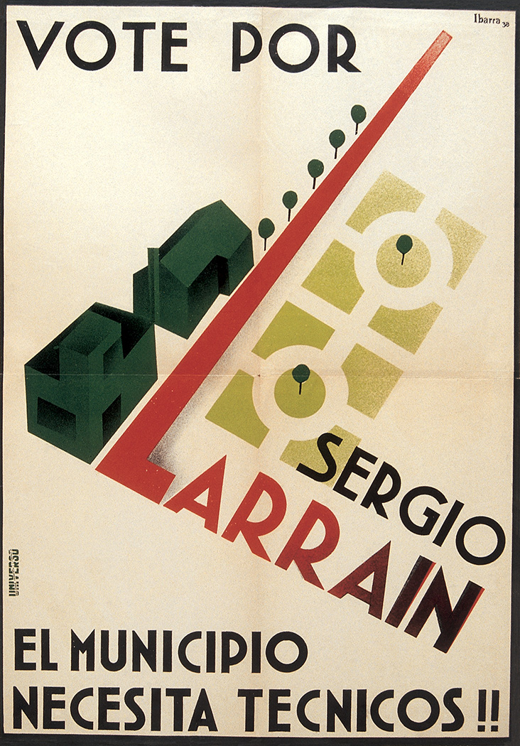 Afiche de campaña de Sergio Larraín García-Moreno para la elección municipal de Chile de 1938. Larraín era candidato a regidor por el Partido Conservador en la comuna de Santiago.